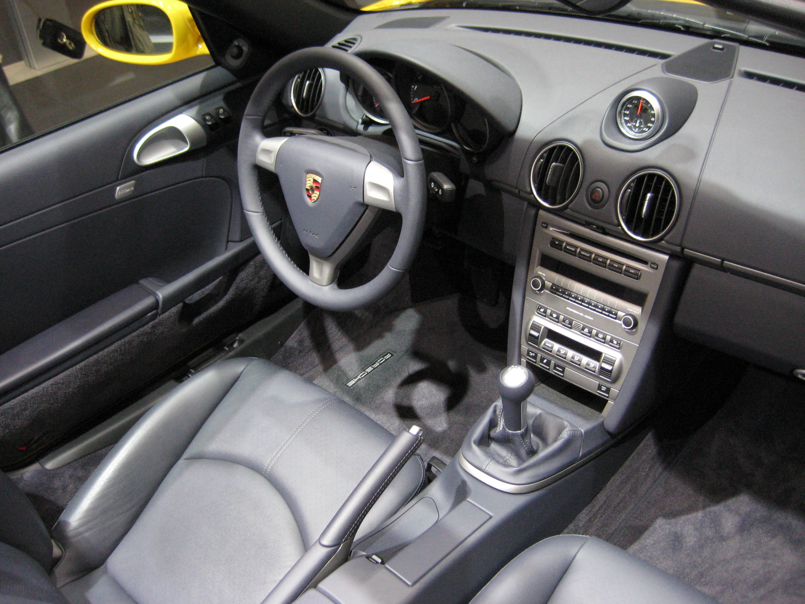 Porsche 987 Boxster Interior